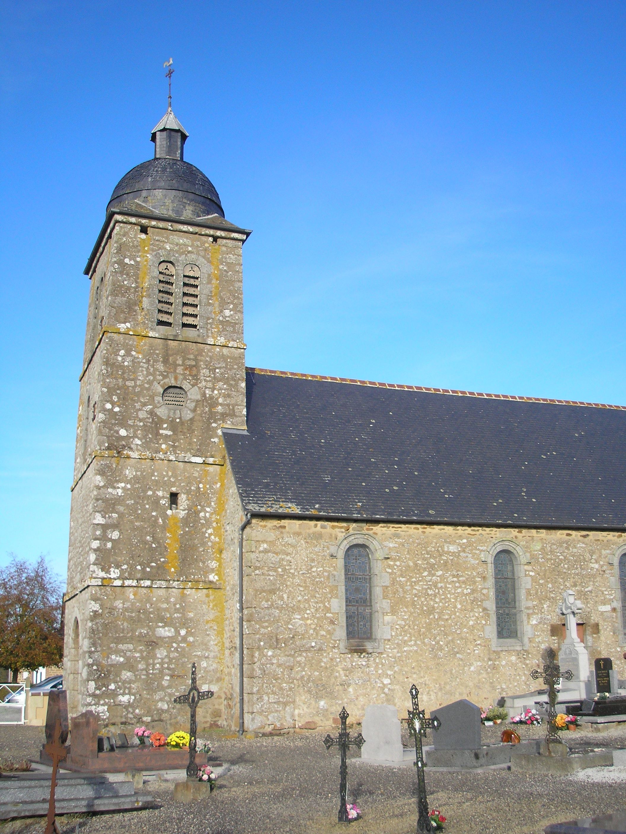 Sainte-Marie-la-Robert (Normandie, France). L'église Sainte-Marie.